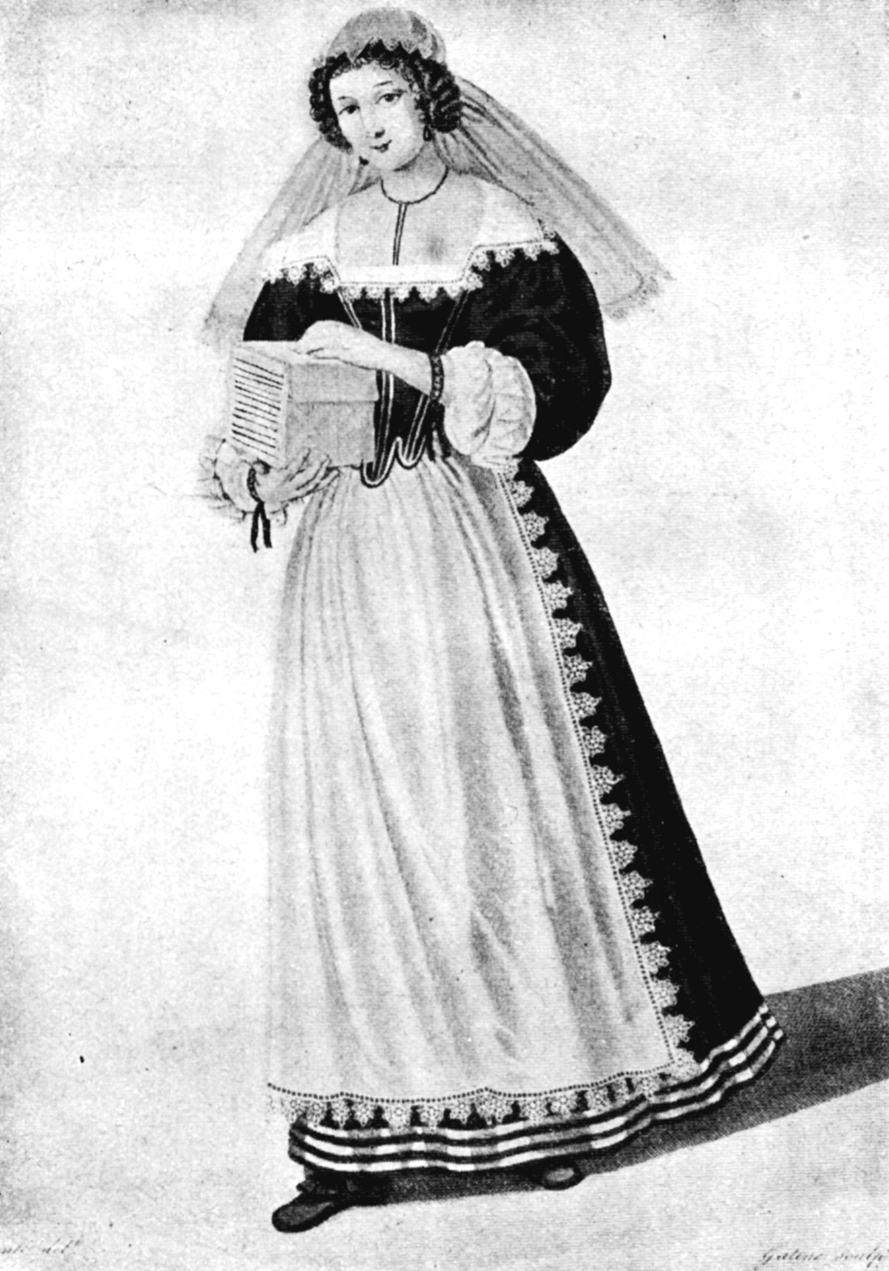 „Pariser Zofe der Renaissancezeit“